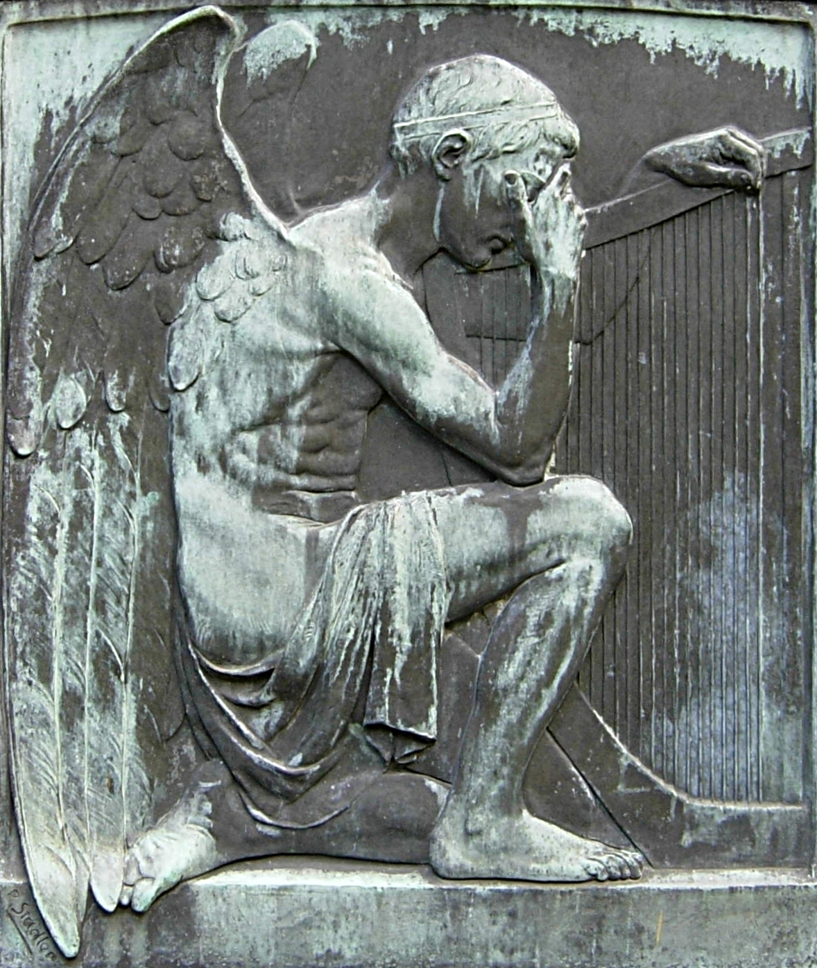 Paul Stadler (* 1875 Freiwaldau, † 1955 Bad Wildungen): Trauernder Genius mit Lyra (genauer: mit Epigoneion, einer Knieharfe) an der Begräbnisstätte Raumann auf dem Poppelsdorfer Friedhof in Bonn. Die Annahme, dass der Schriftzug P. Stadler links unten auf Paul Stadler hinweist, wird gestützt durch die Art der Signatur eines anderen, ihm zugeschriebenen Bildwerks und den antikisierenden Akademiestil des Reliefs.